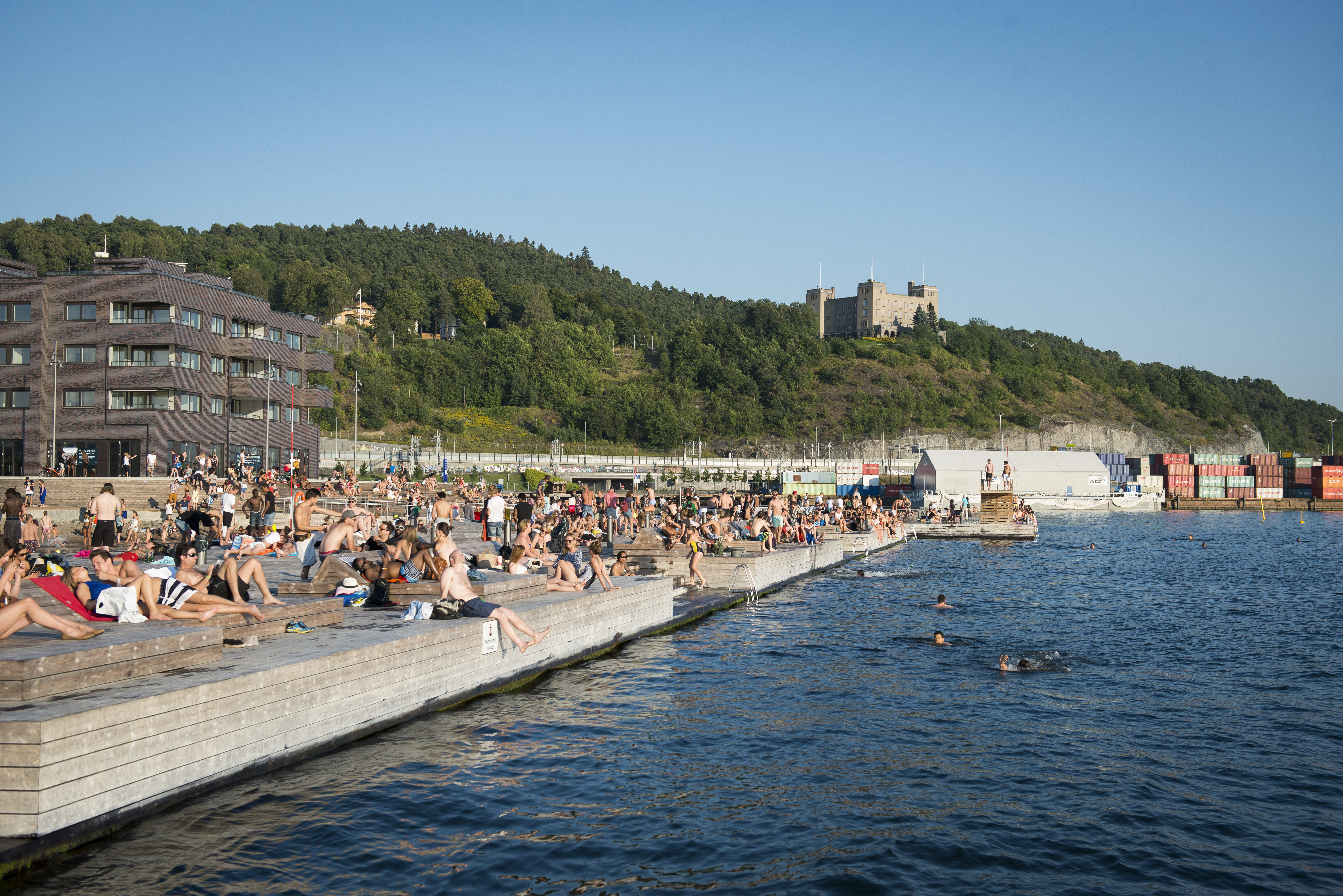 Ytterst på Sørenga Sjøbad, sett mot containerhavna.